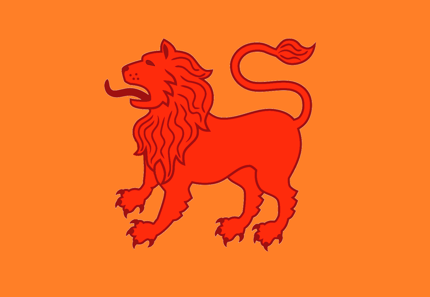 തെക്കുംകൂർ രാജ്യത്തിന്റെ പതാക